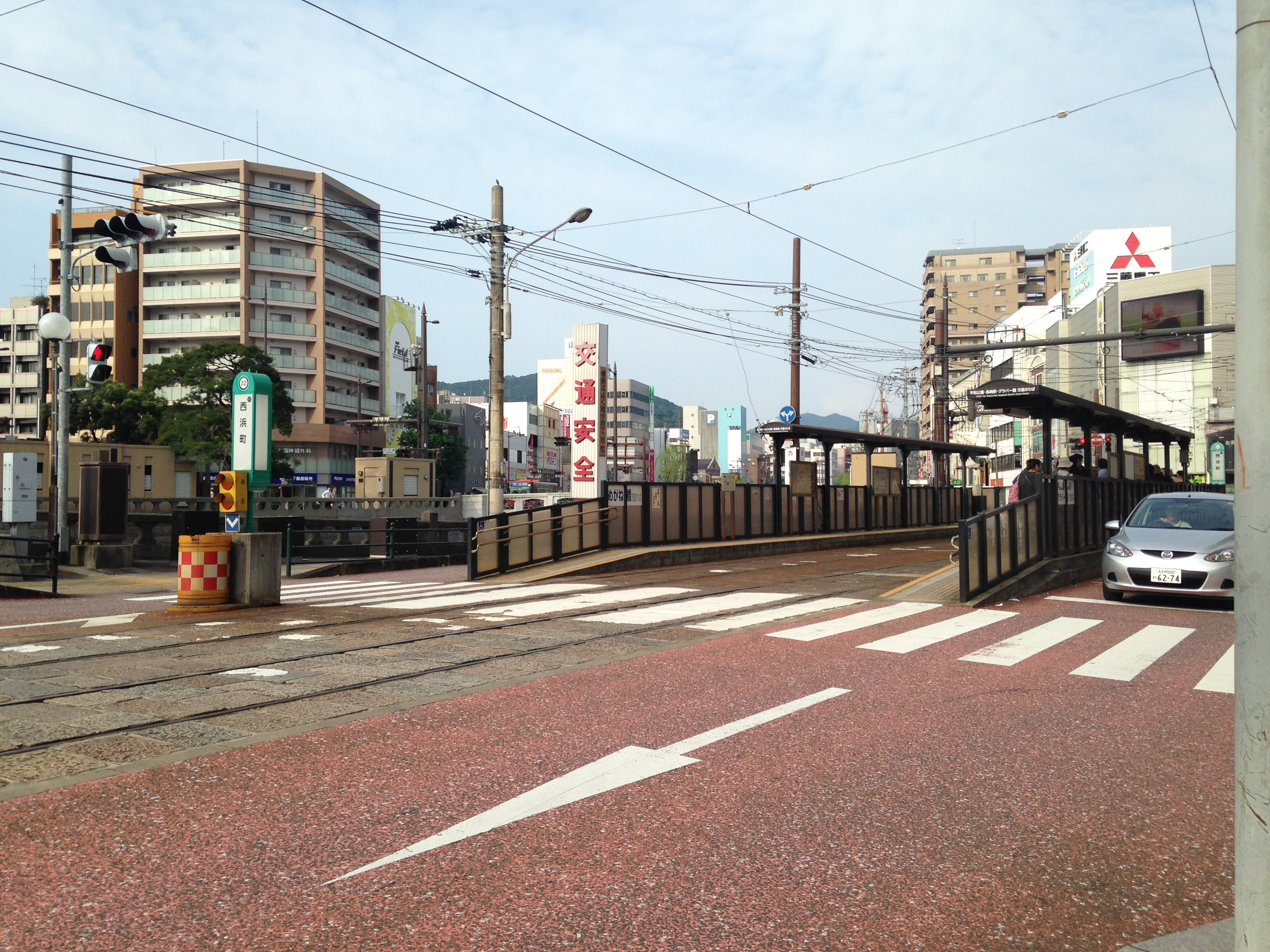 西浜町停留場